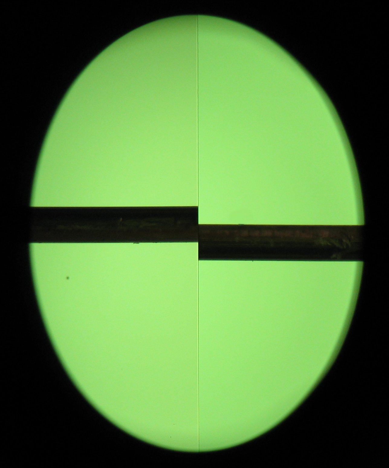 Fluchtlinienprüfer Okular